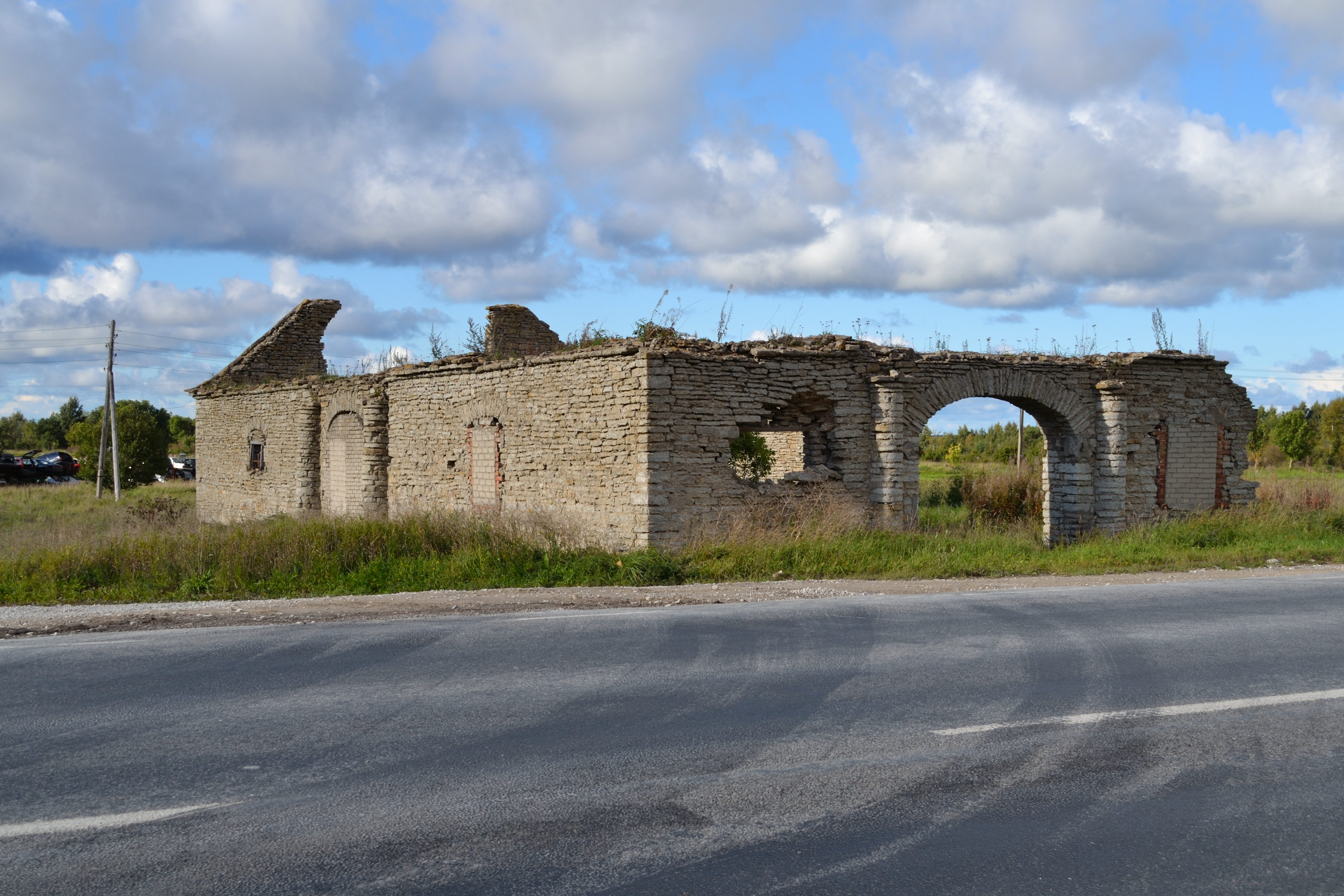 Vääna-Posti kõrtsihoone, 19. saj